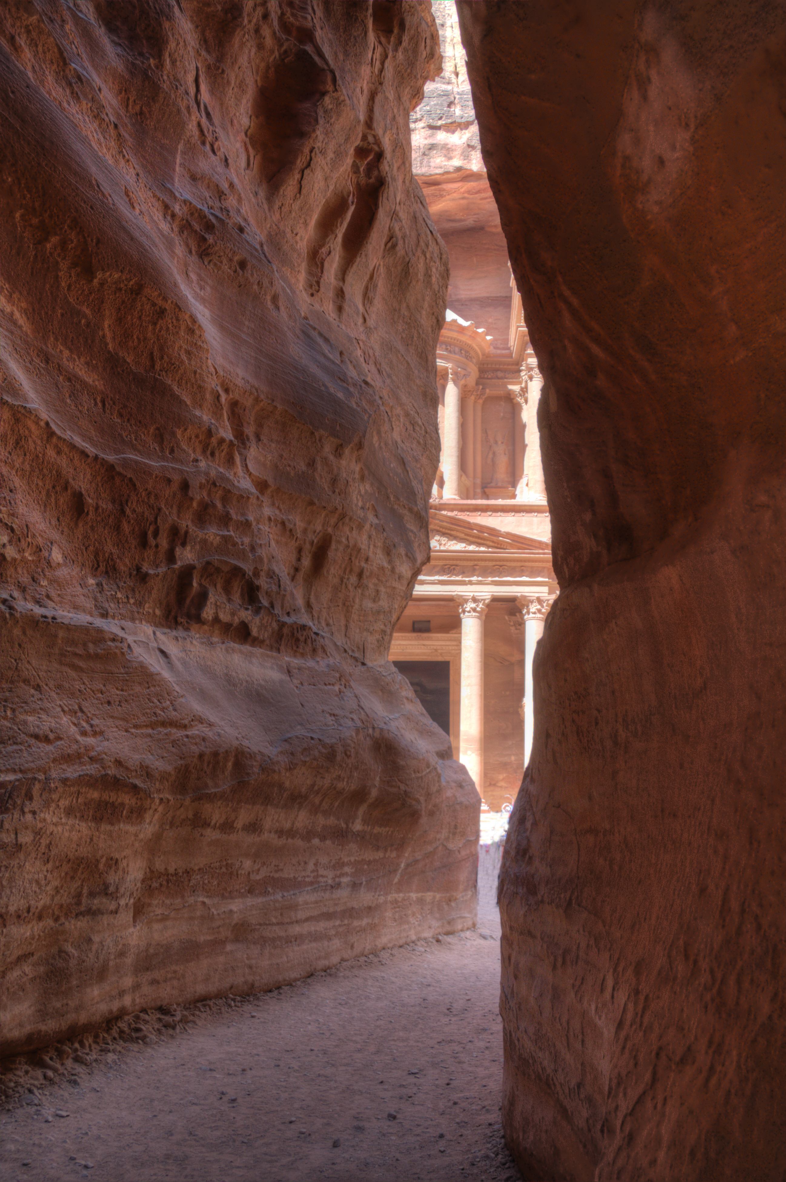 Le débouché du SIQ